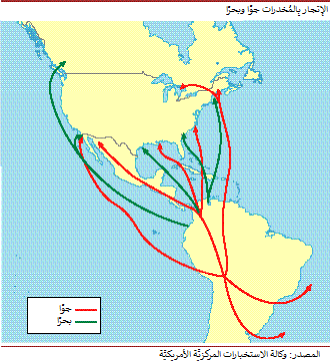 دُروب الإتجار بِالمُخدرات بحرًا وجوًّا من أمريكا الجنوبيَّة إلى أمريكا الشماليَّة.